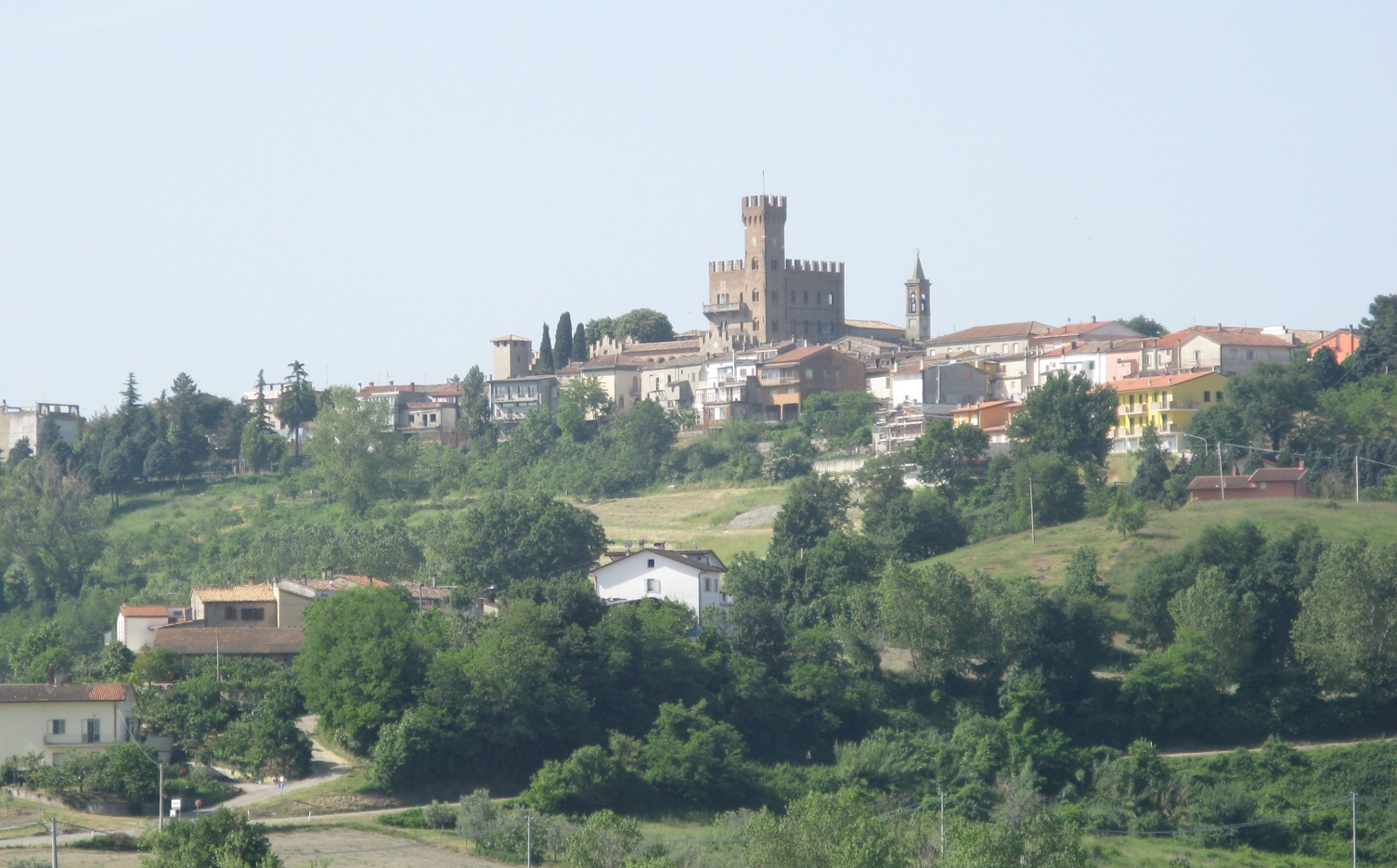 Tavoleto, panorama.